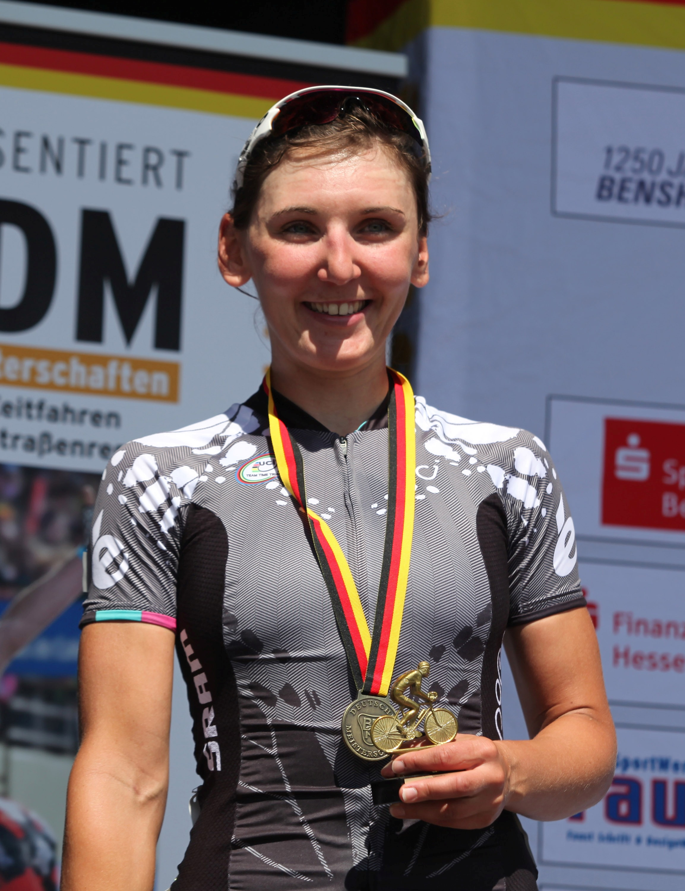 Lisa Brennauer bei der Siegerehrung. Foto von den Deutschen Meisterschaften im Straßenrennen der Männer (Elite) am 28. Juni 2015 in Bensheim (Hessen)